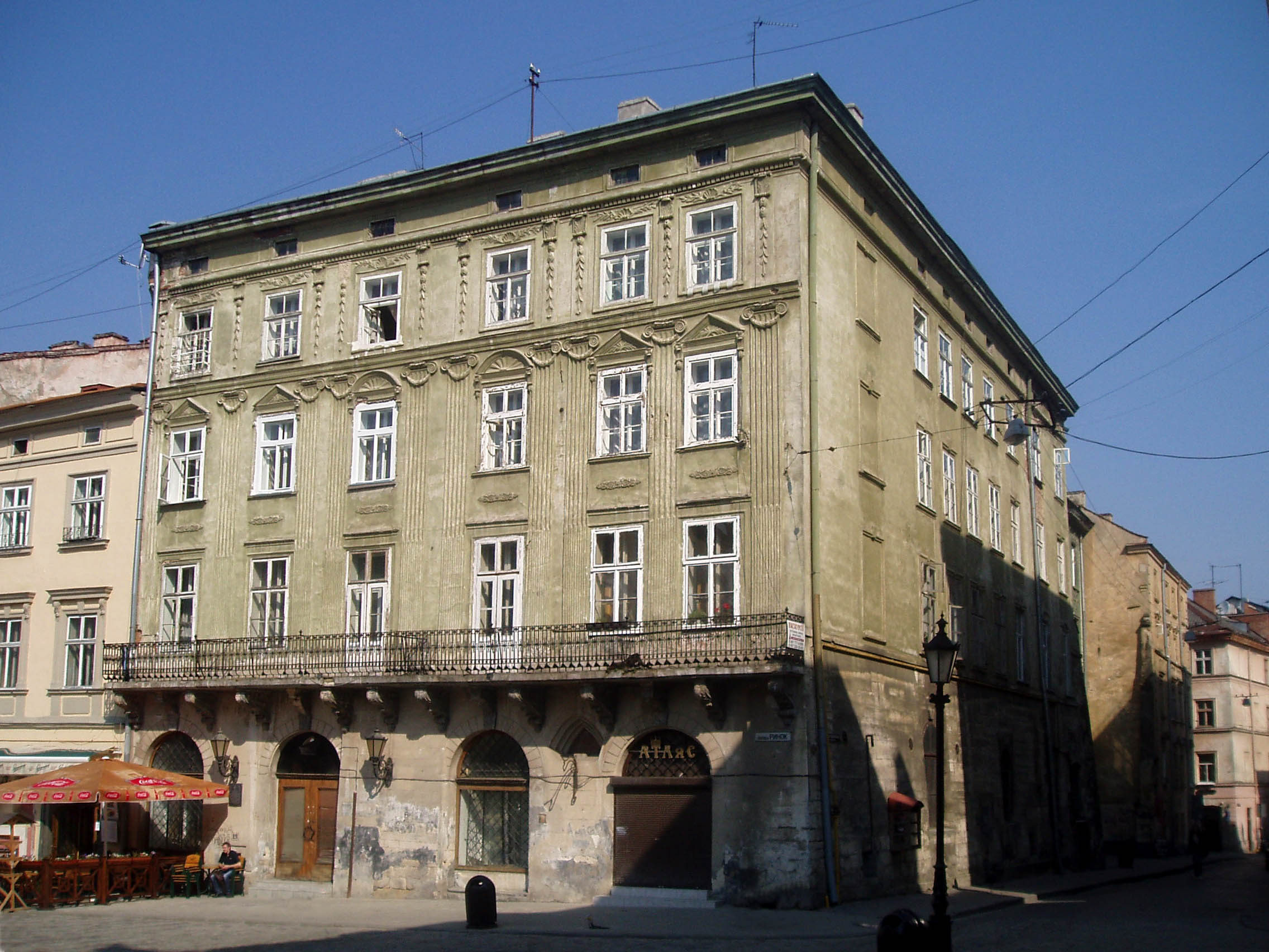 Будинок № 45 на площі Ринок у Львові.